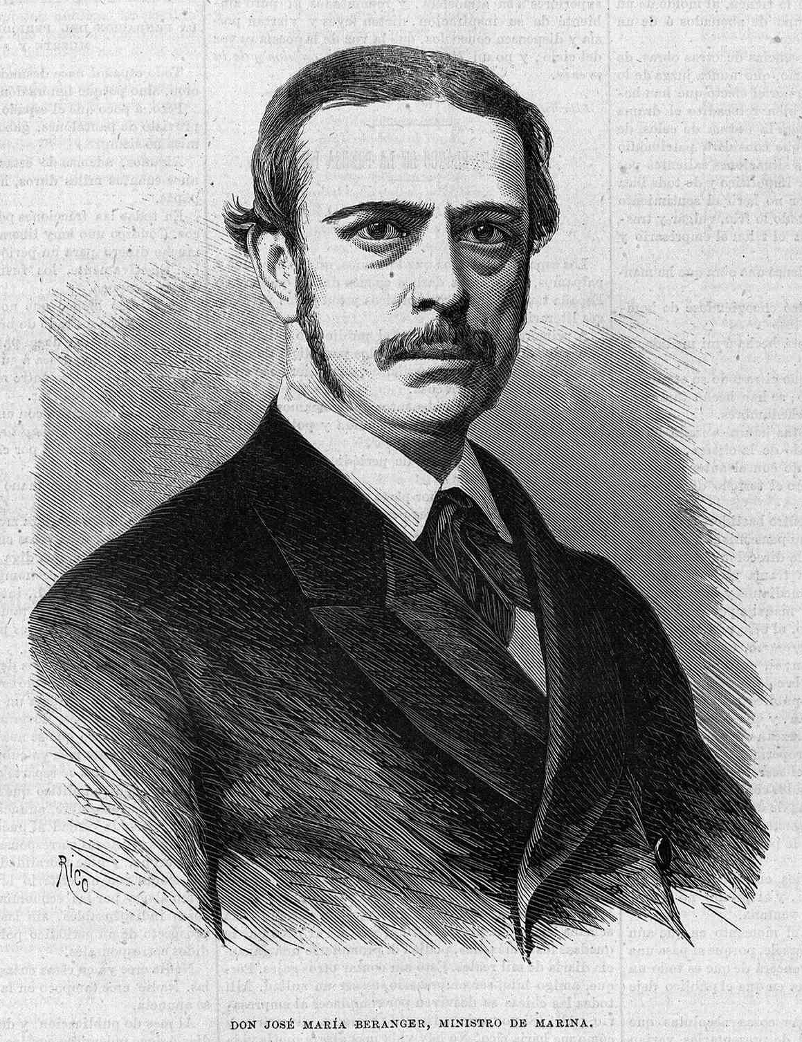 José María Beranger, en la revista La Ilustración de Madrid.